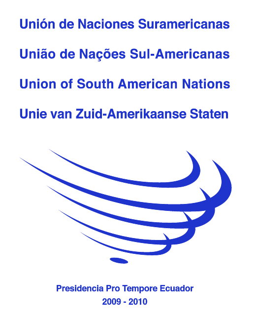 Logo de UNASUR, Presidencia Pro Tempore Ecuador 2009-2010